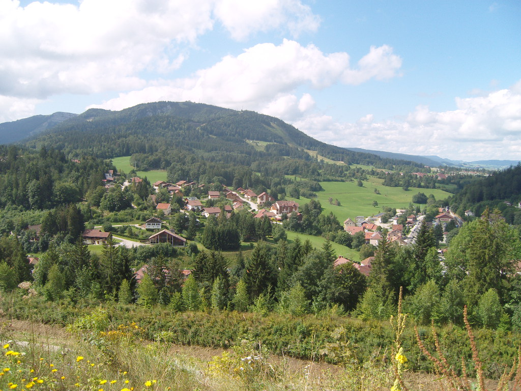 Le Morond,vue des Hôpitaux-Neufs